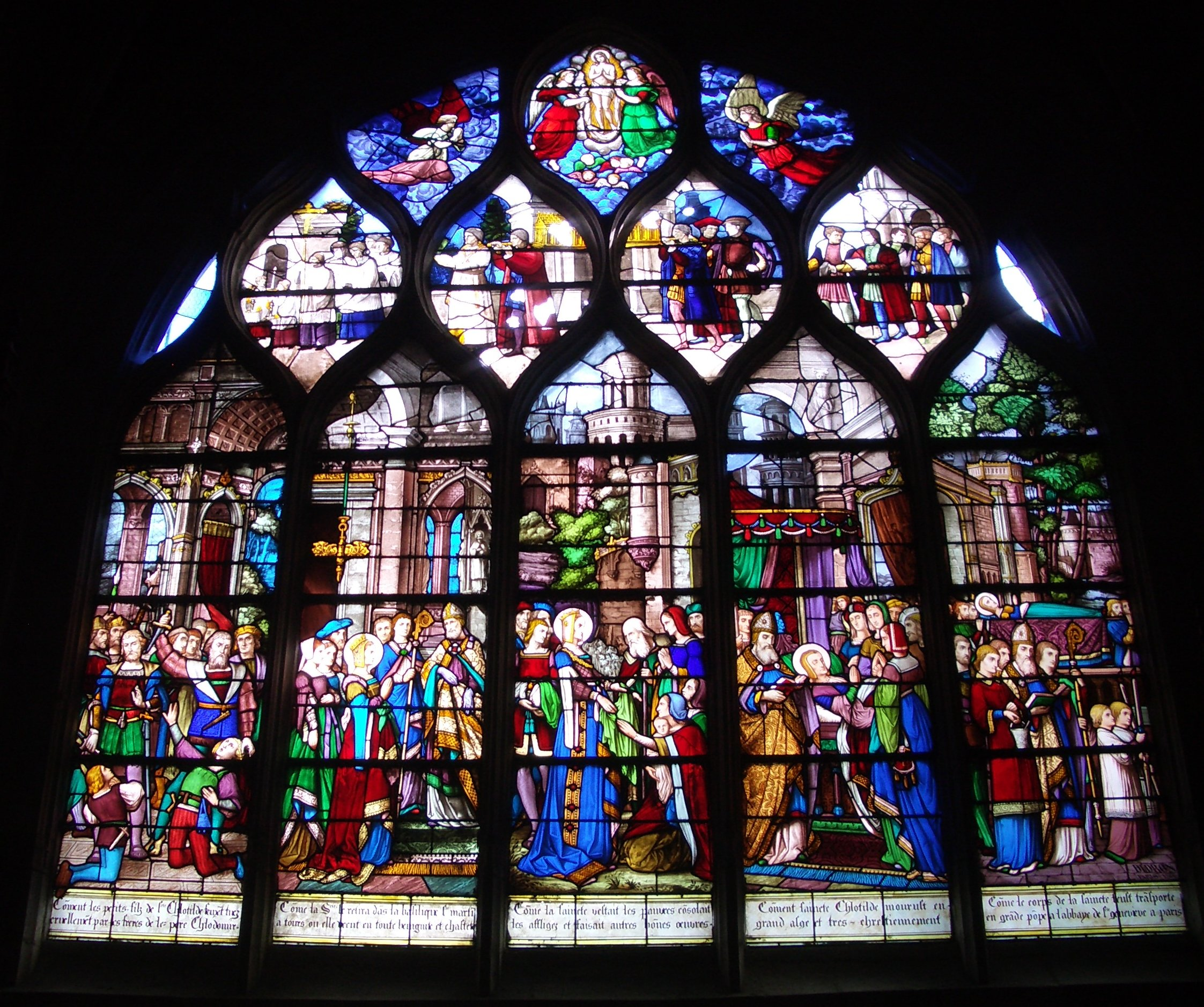 Vitrail de Didion (1866) relatant la vie de Ste Clotilde dans l'église Notre-Dame des Andelys (Les vitraux de Haute-Normandie, Éditions du CNRS, Paris 2001, p. 101, ISBN 2-271-05548-2)